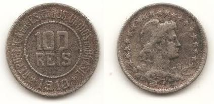 Moeda brasileira em cuproníquel, de 100 réis, cunhada em 1918. Também chamada de tostão.